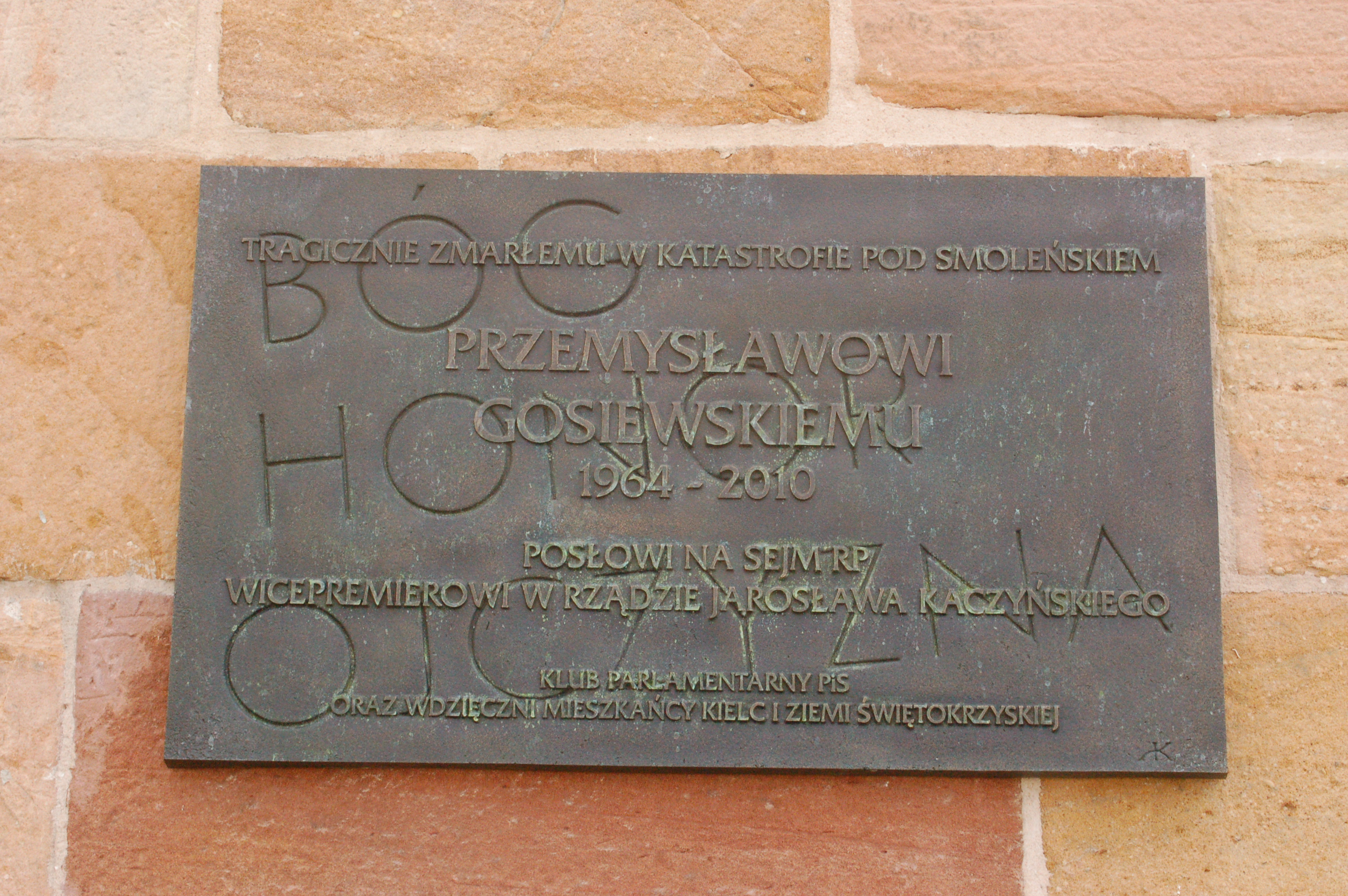 Kathedrale in Kielce